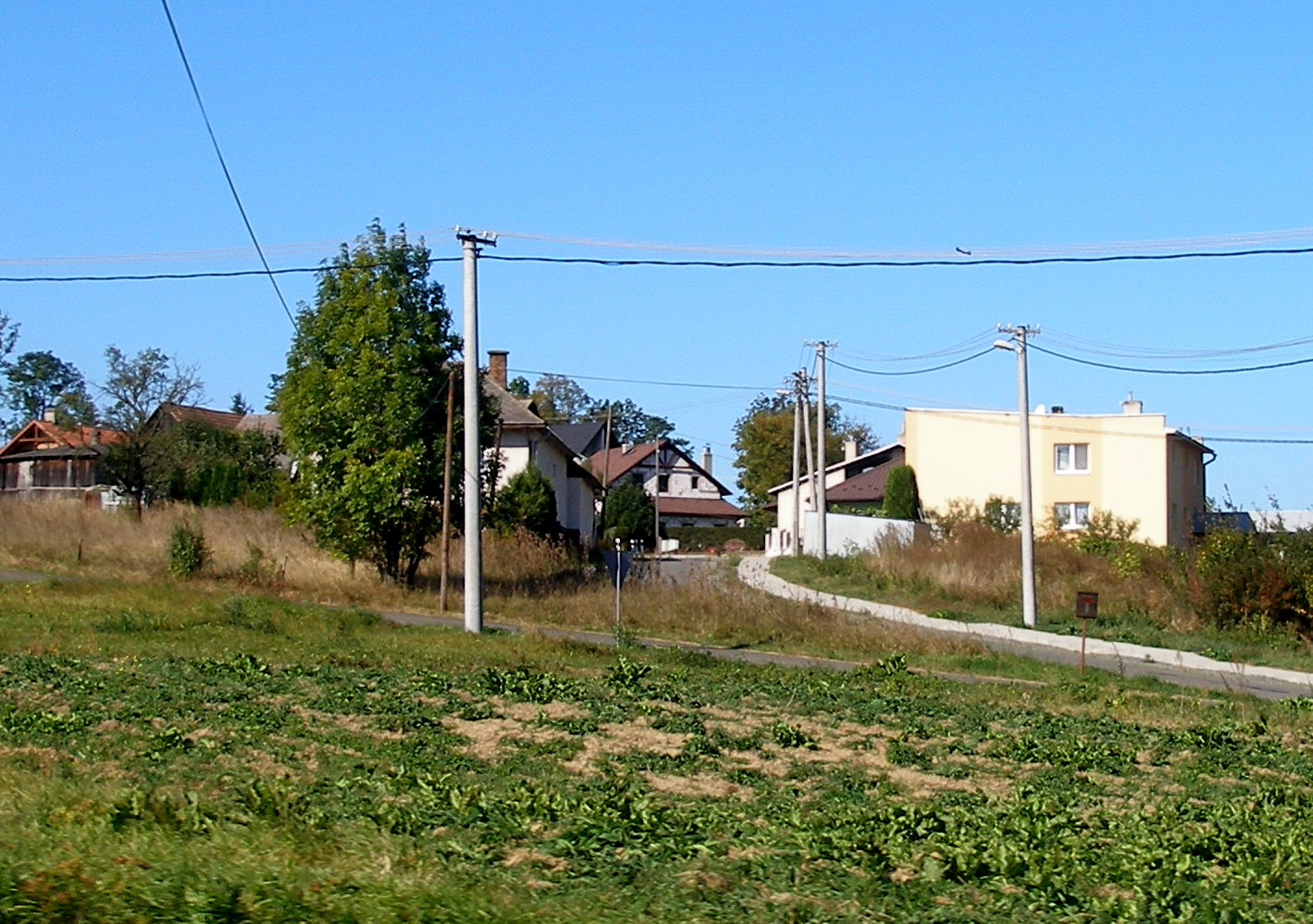 Obec Janovce okres Bardejov.